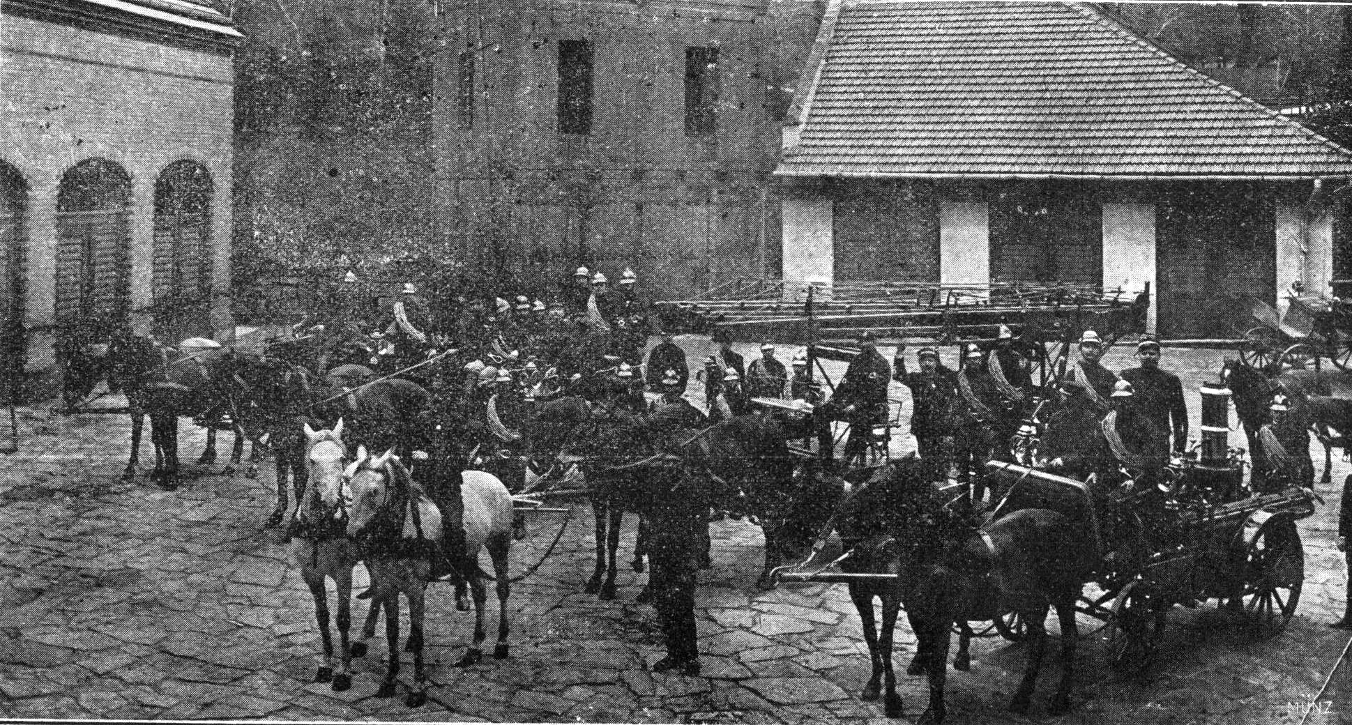 Пожежна команда Львова: Виїзд кінної пожежної команди